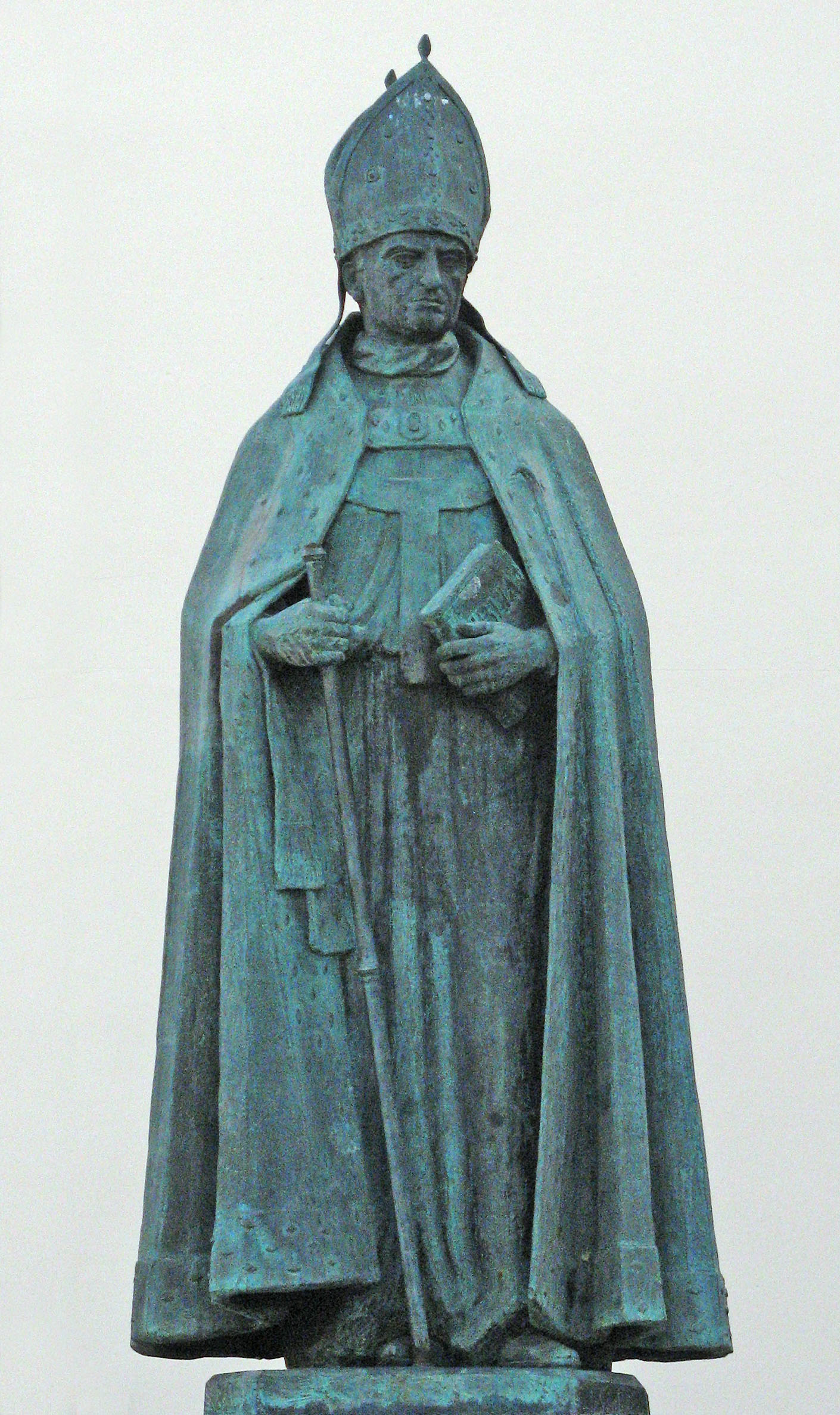 Alonso Carrillo, el pueblo de Alcalá MCMLXXXVII Alcalá de Henares. Comunidad de Madrid. España